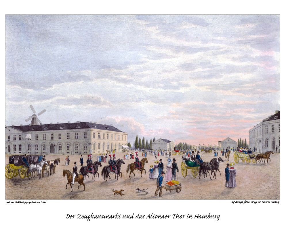 Der Zeughausmarkt und das Altonaer Thor (Millerntor) in Hamburg, gezeichnet von Christoffer Suhr, Litho von Peter Suhr